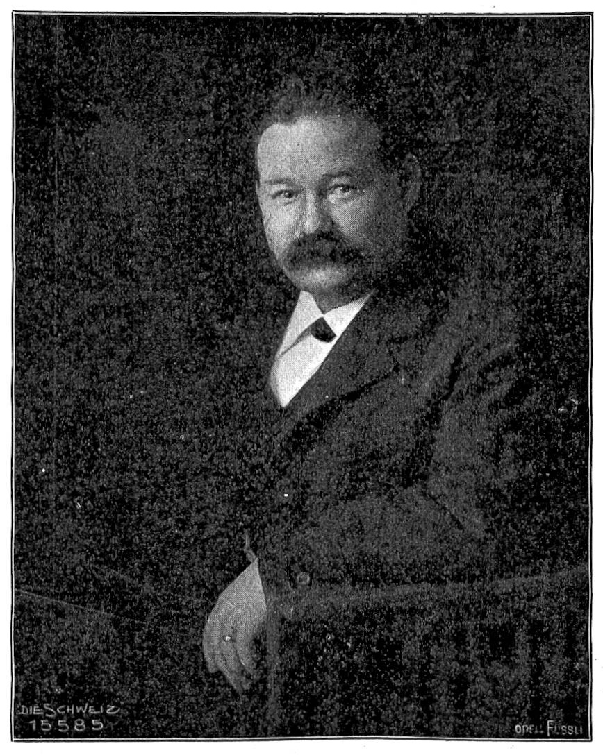 Porträtphoto des Journalisten Fritz Marti